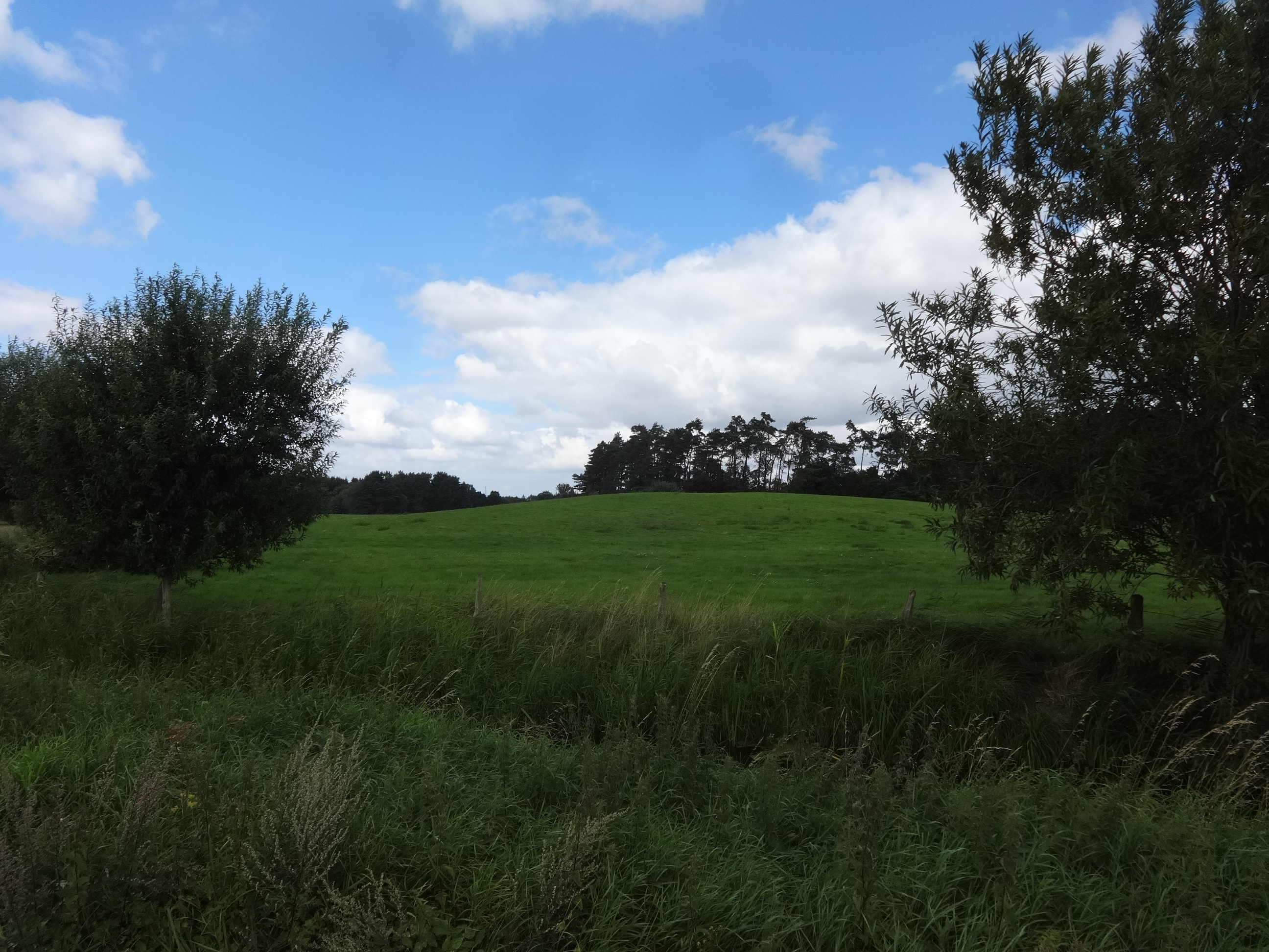 Turmügel der Burg Ekberg in Segebadenhau, ein Ortsteil der Gemeinde Sundhagen in Mecklenburg-Vorpommern